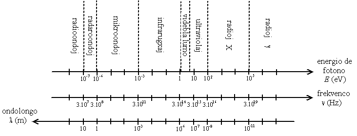 Classification des ondes électromagnétiques en fonction de leur longueur d'onde, de leur fréquence ou de l'énergie des photons